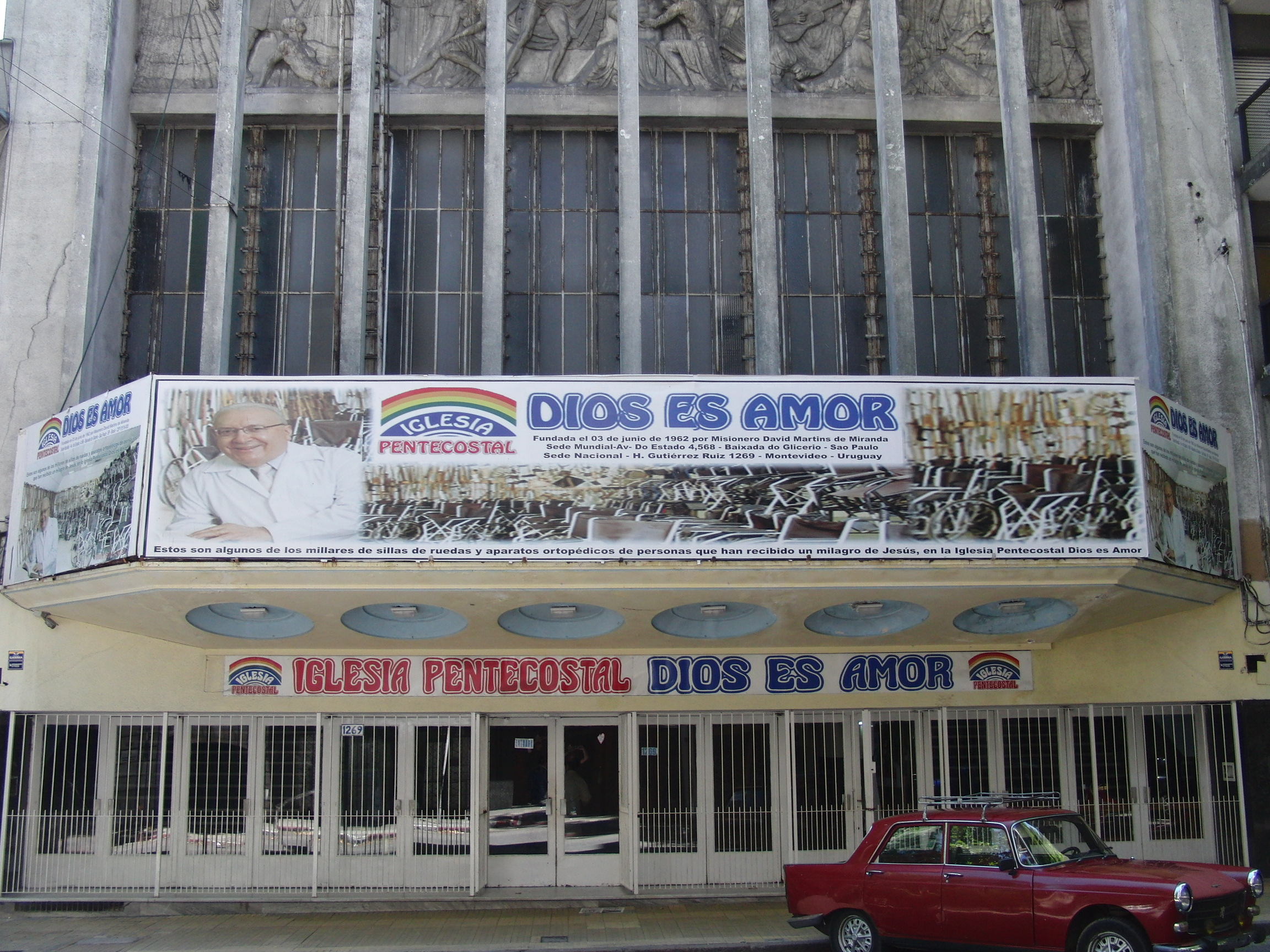 In einem ehemaligen Kino in Montevideo residiert heute die Kirche "Gott ist Liebe", eine Pfingstgemeinde.